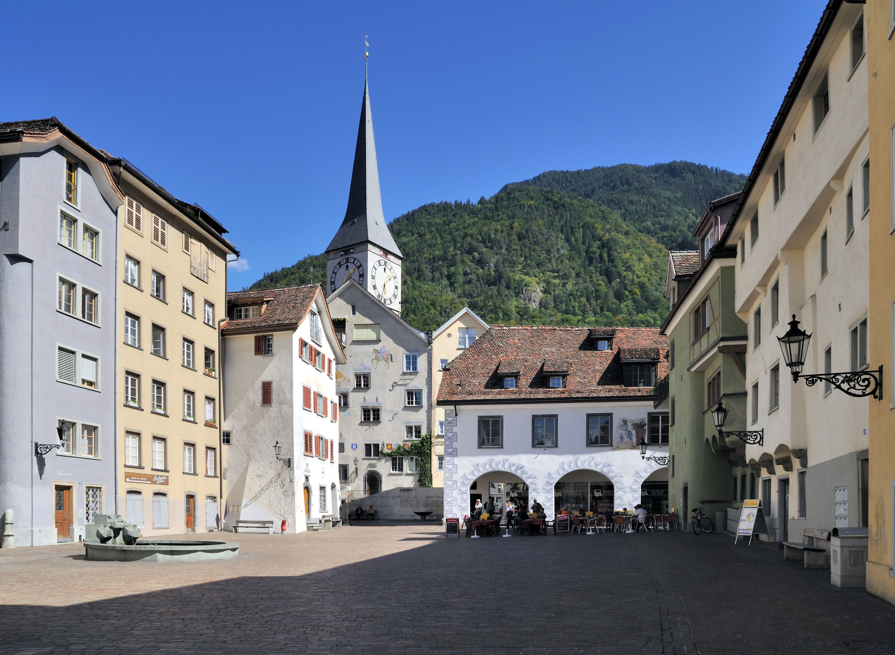 Churer Altstadt: Blick vom Platz Arcas auf die umliegenden Häuser und den Kirchturm der Martinskirche